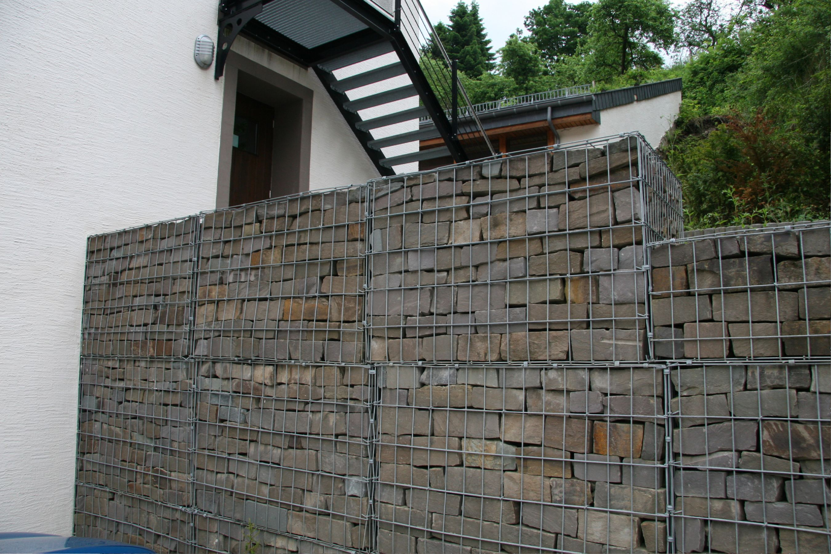 Gabiounen als Gestaltungselement ronderëm d'Haus - Schiefer - Wolz - 30. Mee 2008.